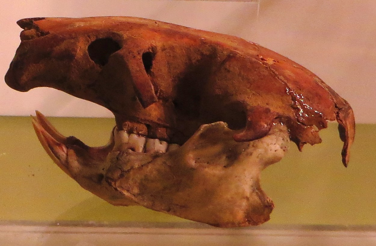 Fossil of Canariomys, an extinct mammal- Took the picture at Museo de la Naturaleza y el Hombre - Tenerife